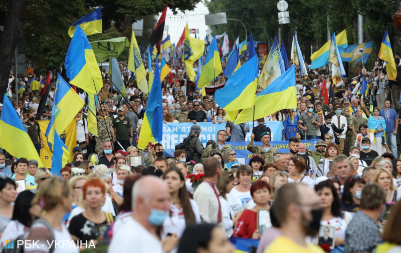 Колона учасників Маршу 24 серпня 2020-го